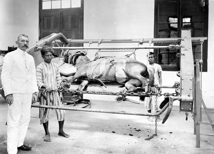 Repronegatief. Foto gemaakt tijdens de filmopnames die Lamster in opdracht van het Koloniaal Instituut in de periode 1912-1913 in Nederlands Indie maakte. (JvD.okt.09). Veeartsenijkundig laboratorium te Buitenzorg; paard in de bascule